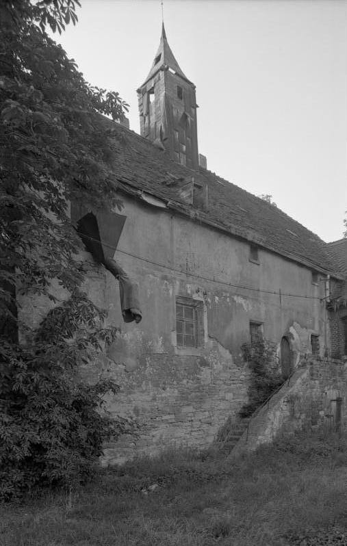 11.-18.8.1991 Bundesland Sachsen-Anhalt Roßbach, Gutshof Goldacker (von hier befehligte Friedrich II. die Schlacht bei Roßbach)